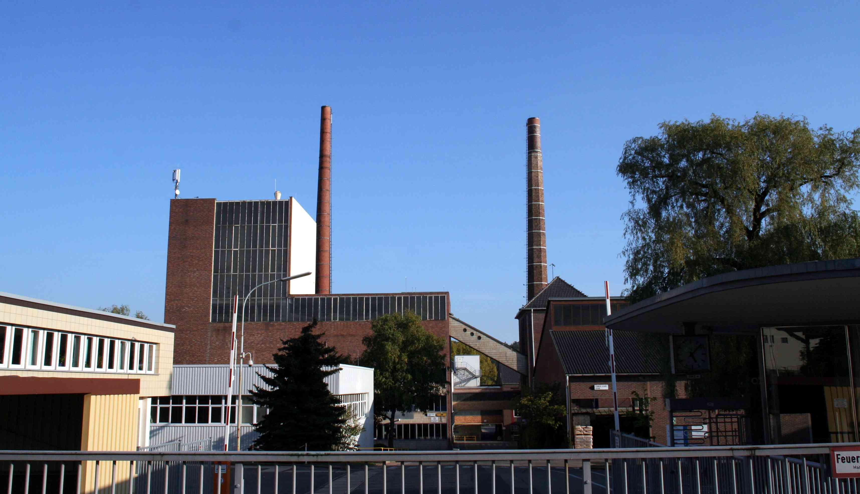 ehem. Annawerk in Rödental, Haupteingang